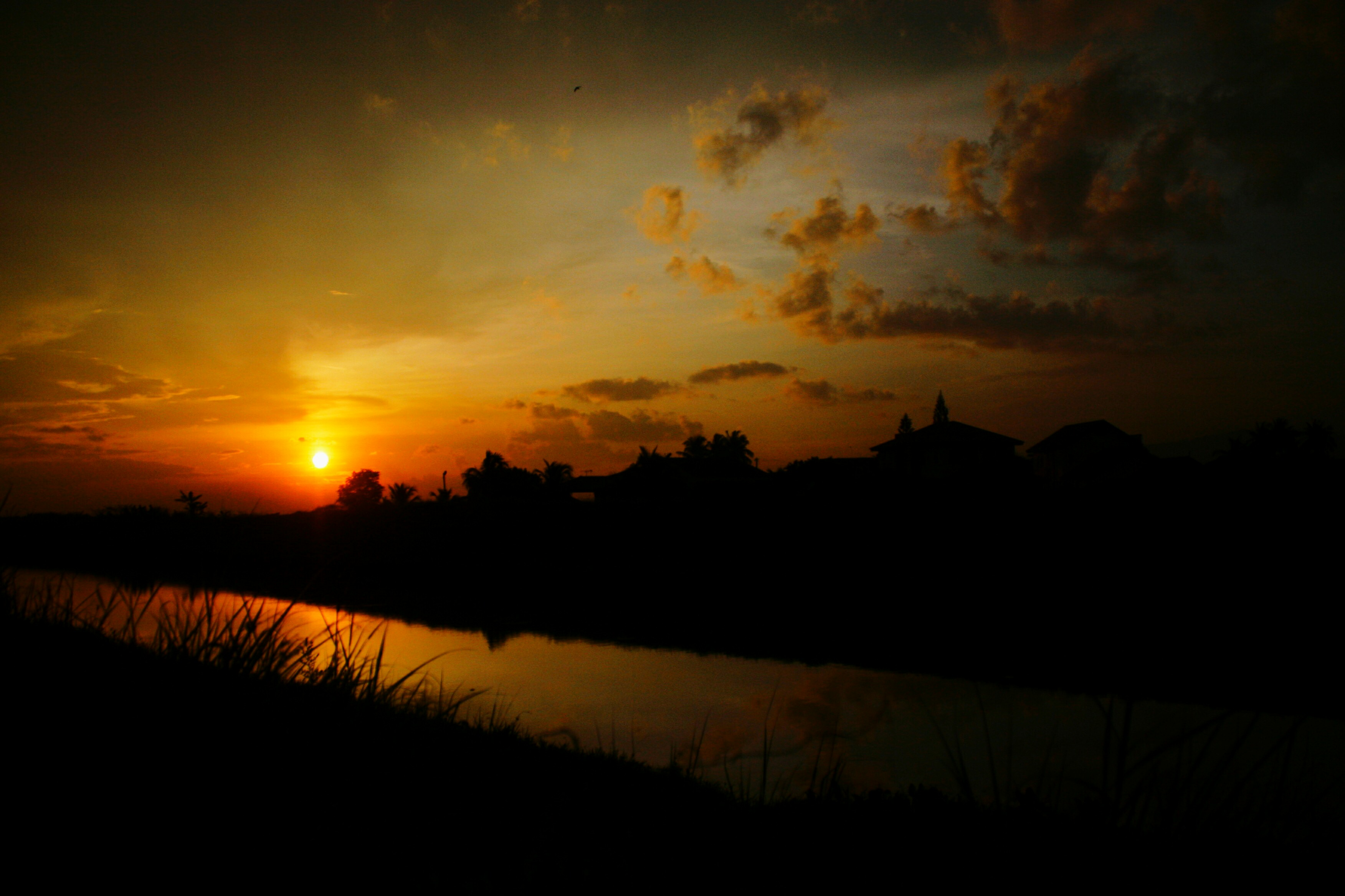 SUNSET KUBANG PASU